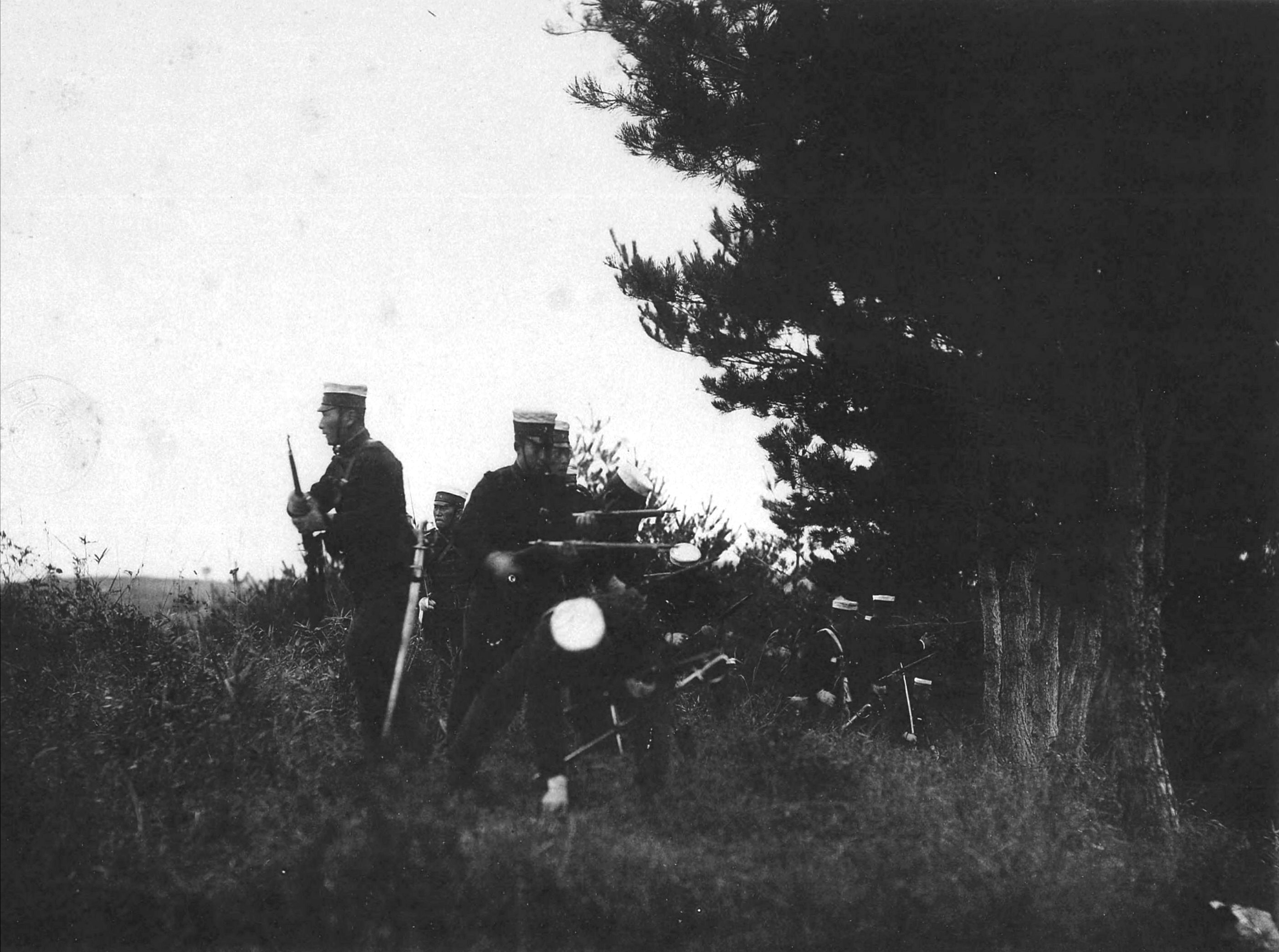 明治34年秋期陸軍特別大演習に於いて徒歩戦を行う騎兵